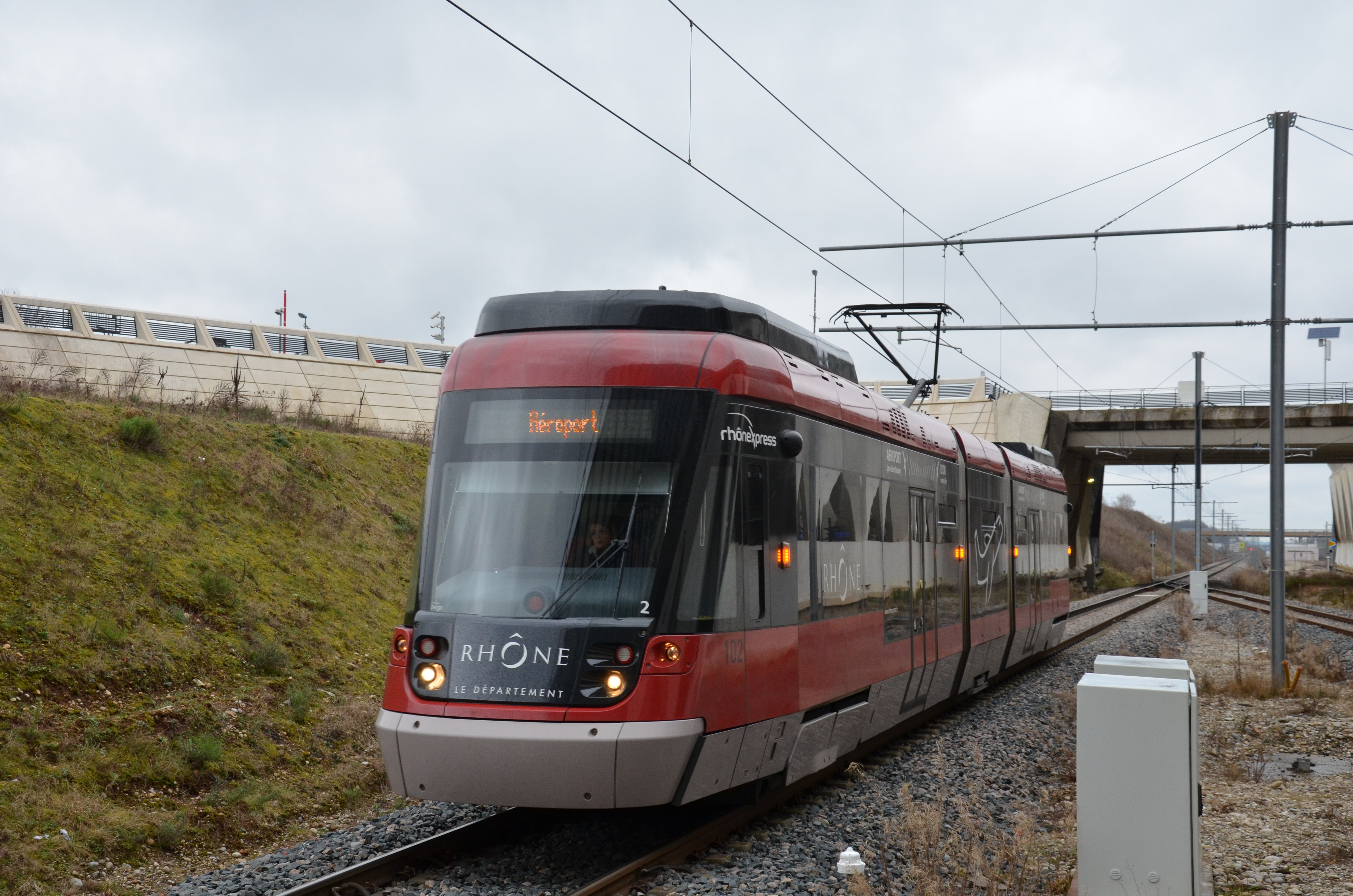 Rame Stadler Tango n°102 arrivant à l'aéroport Lyon Saint-Exupéry, sur la ligne de tram-train RhônExpress.